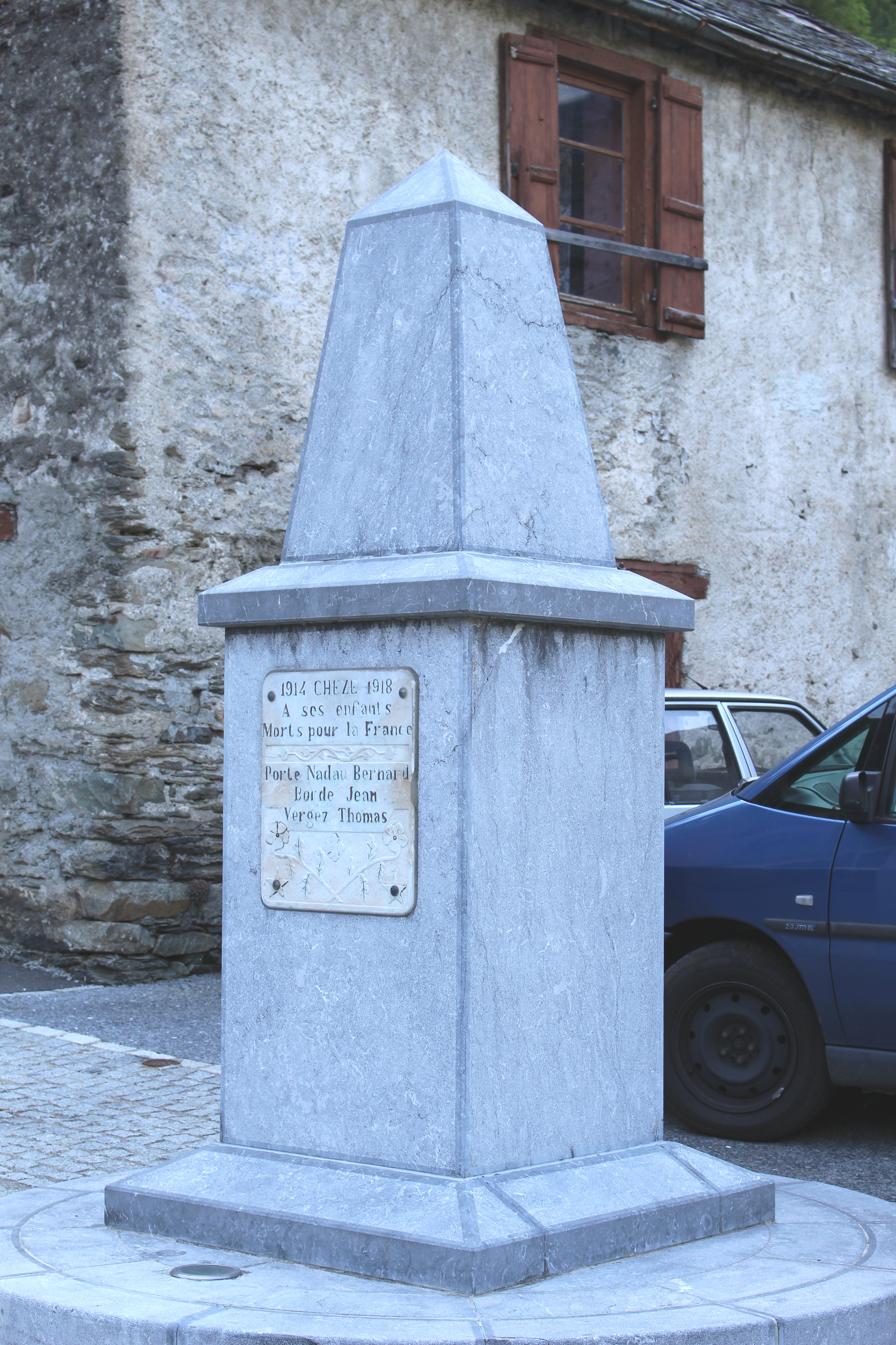 Monument aux morts de Chèze (Hautes-Pyrénées)